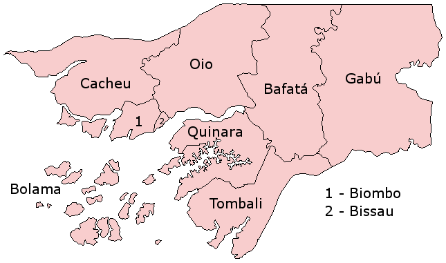 División administrativa de Guinea-Bissáu